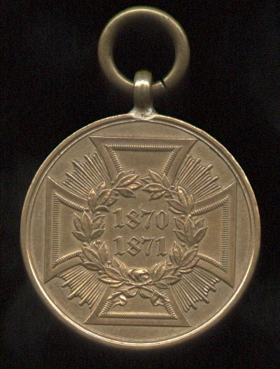 Deutsches Reich, Kriegsdenkmünze 187071, Kämpferversion, Rückseite